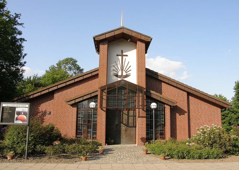 Die Neuapostolische Kirche in Otterndorf